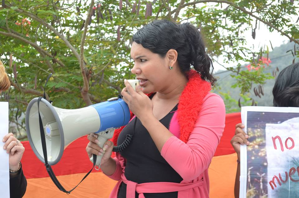 Diane marie rodríguez zambrano protestando en la embajada de rusia en guayaquil y feminista